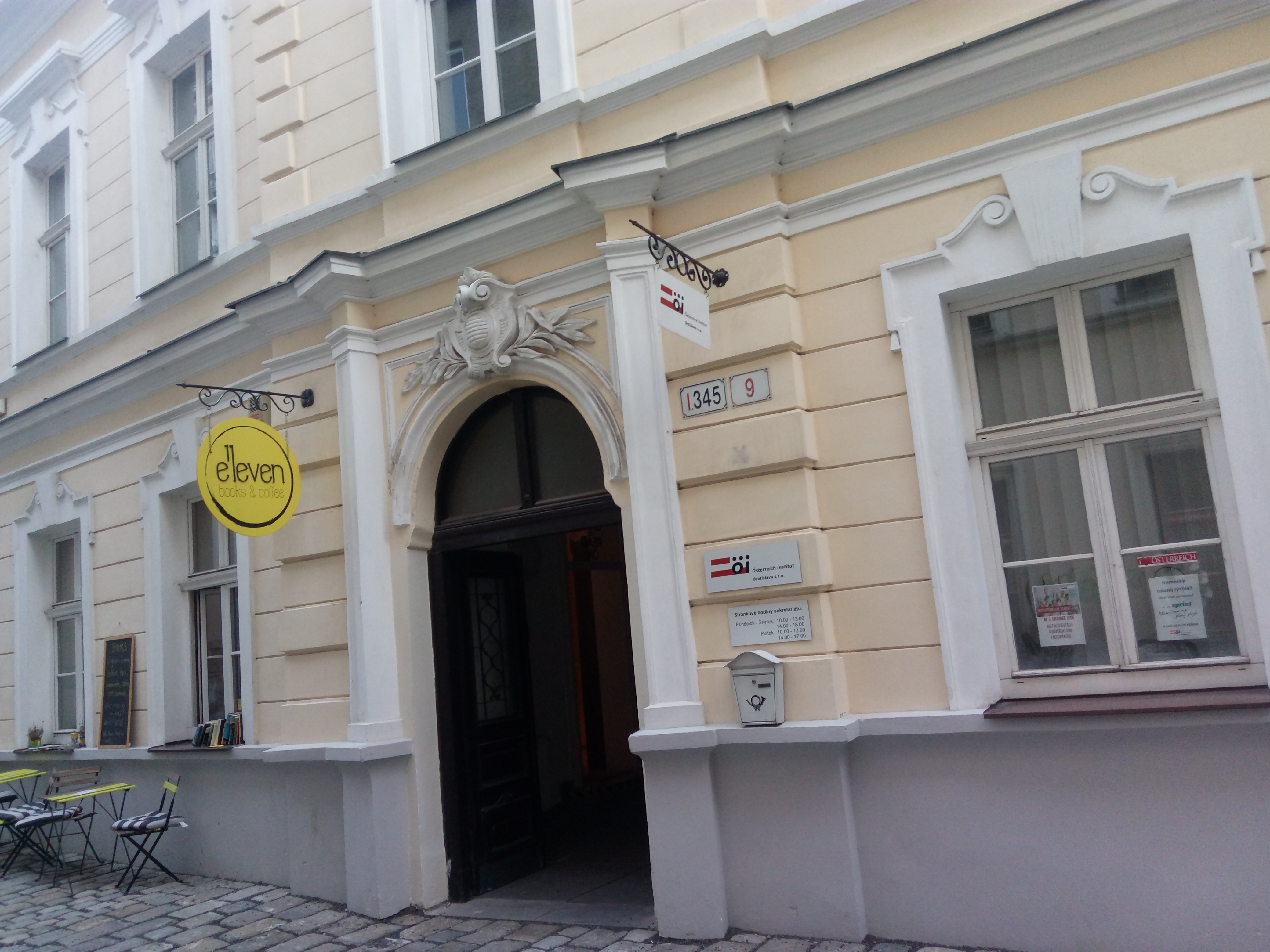 Baštová 9, Staré Mesto, Bratislava